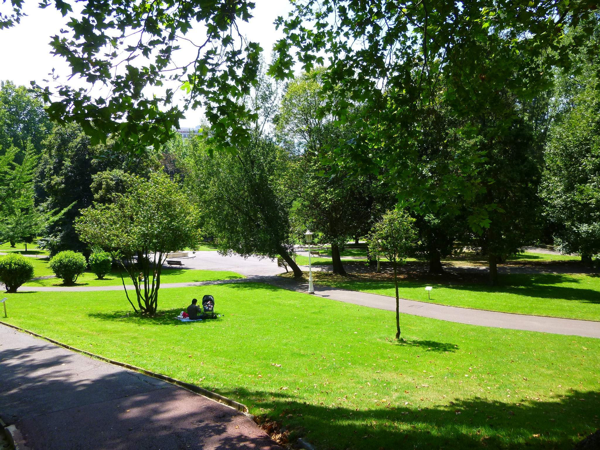 Parque de Doña Casilda Iturrízar, en Bilbao